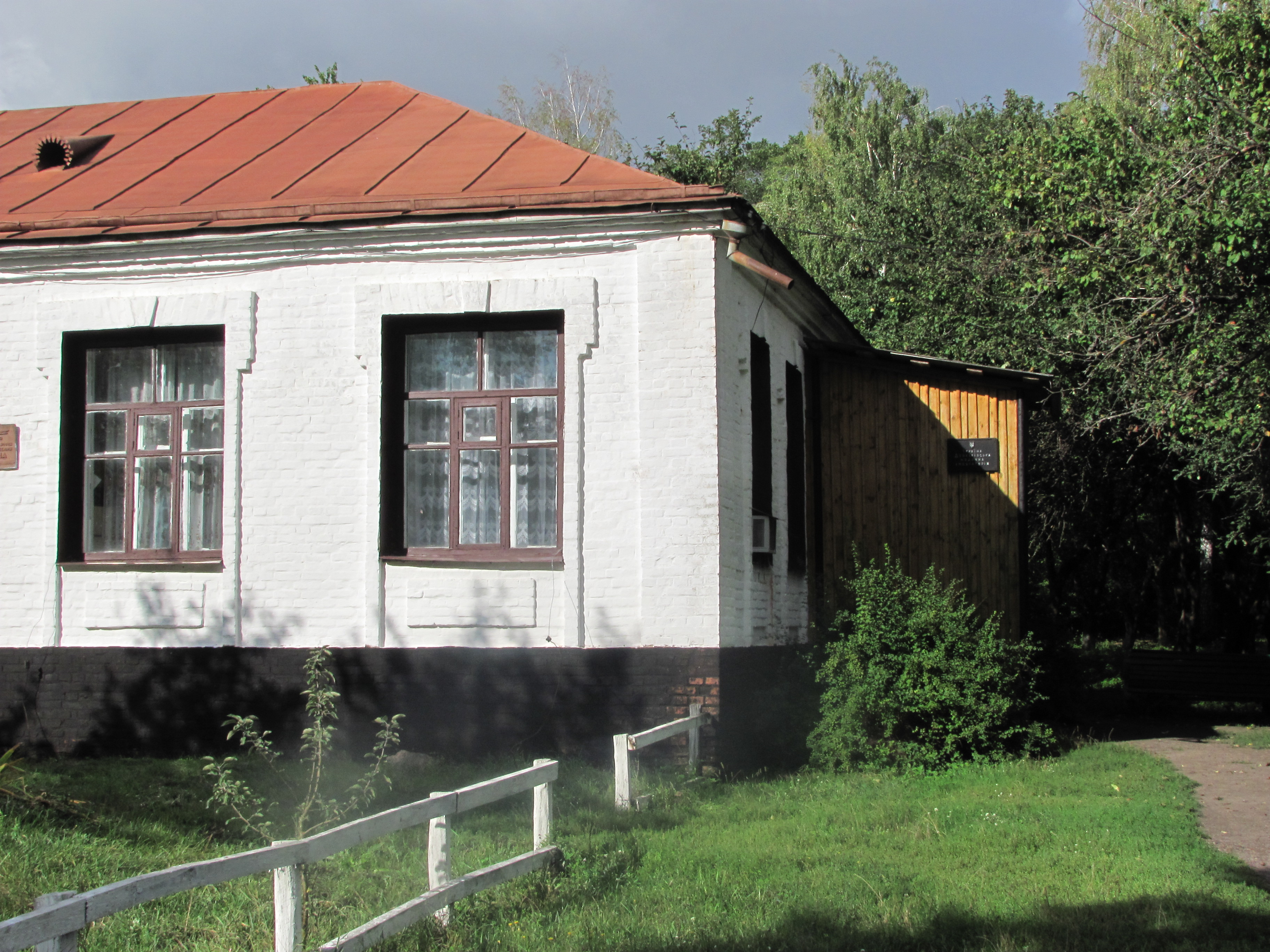 Сільська амбулаторія в Дейкалівці, Полтавська обл.